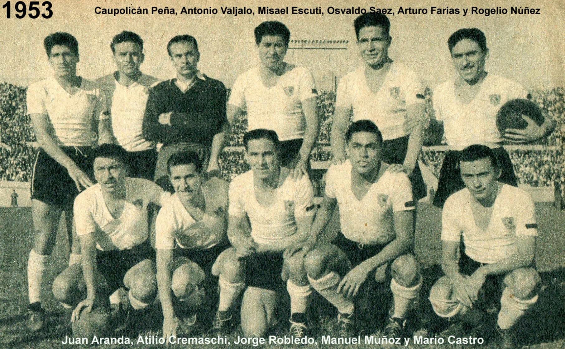 Equipo campeón 1953